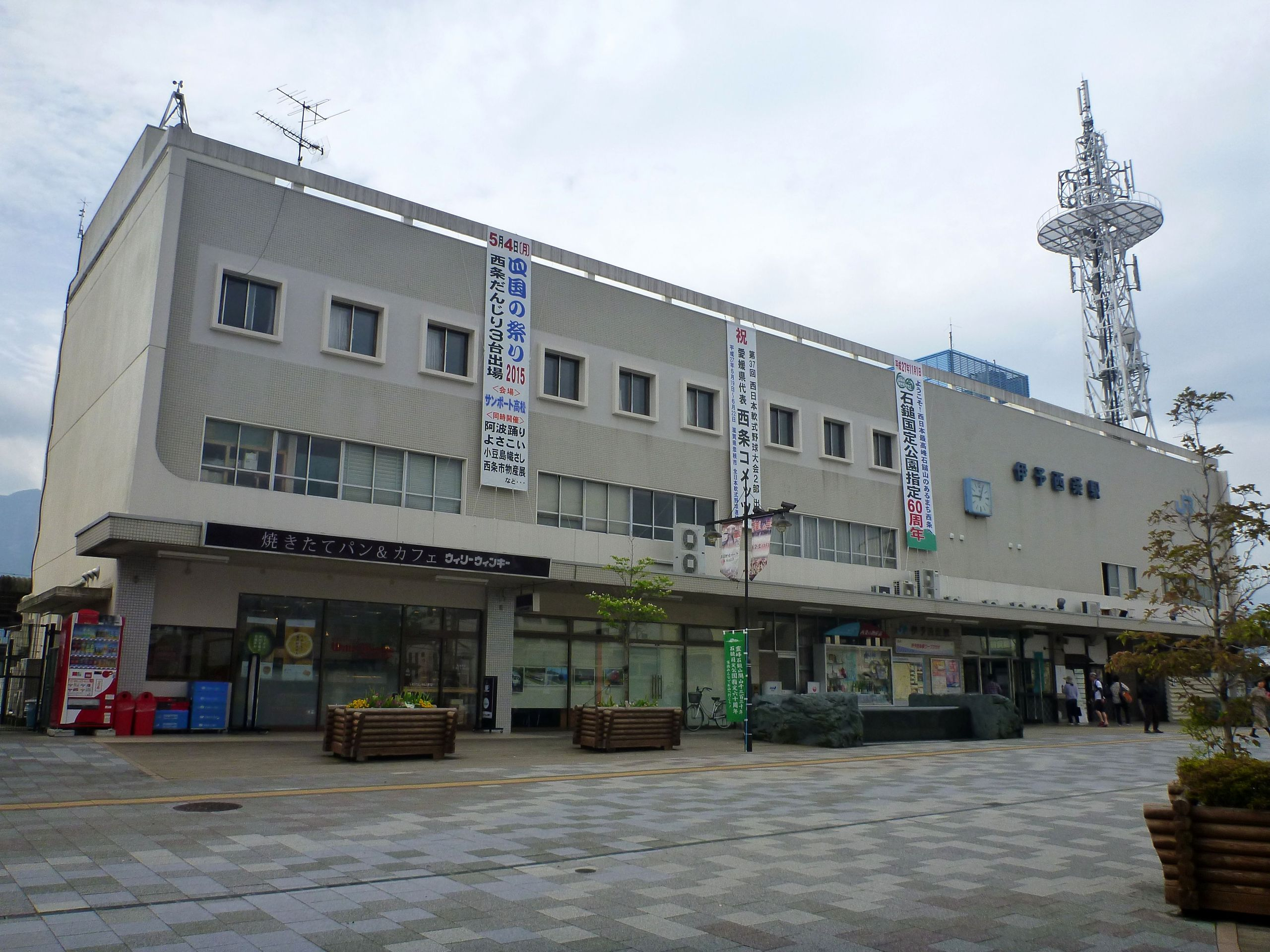 JR Iyo-Saijo Station